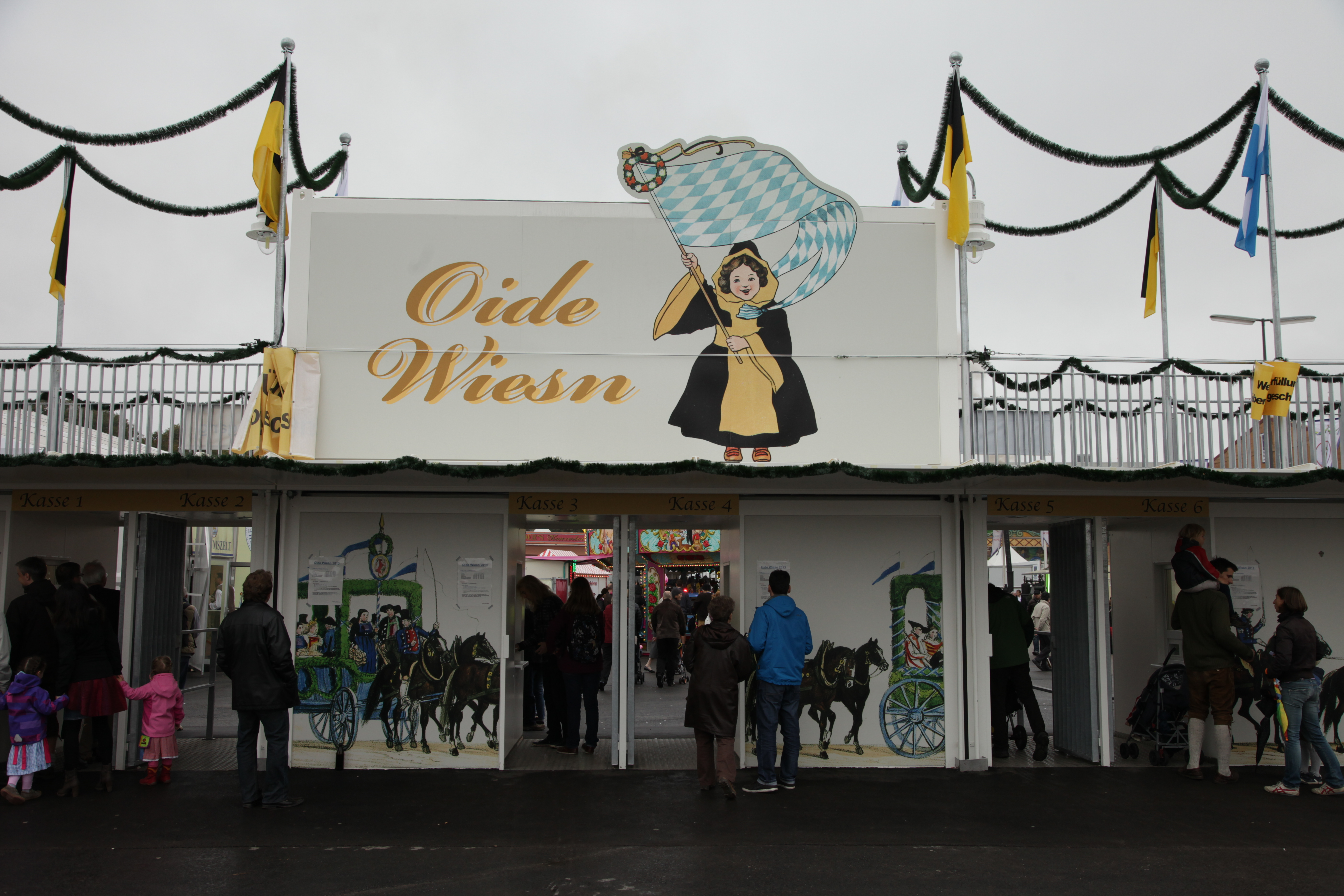 Erstmals neue Eingänge auf der Oiden Wiesn 2013. Bei der letzten Oiden Wiesn 2011 waren es noch provisorische Eingangszelte.